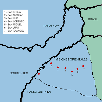 mapa de las misiones orientales trabajo propio pruxo 2007